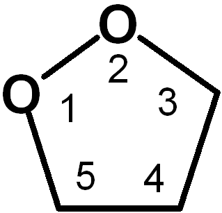 структура 1,2-диоксолана